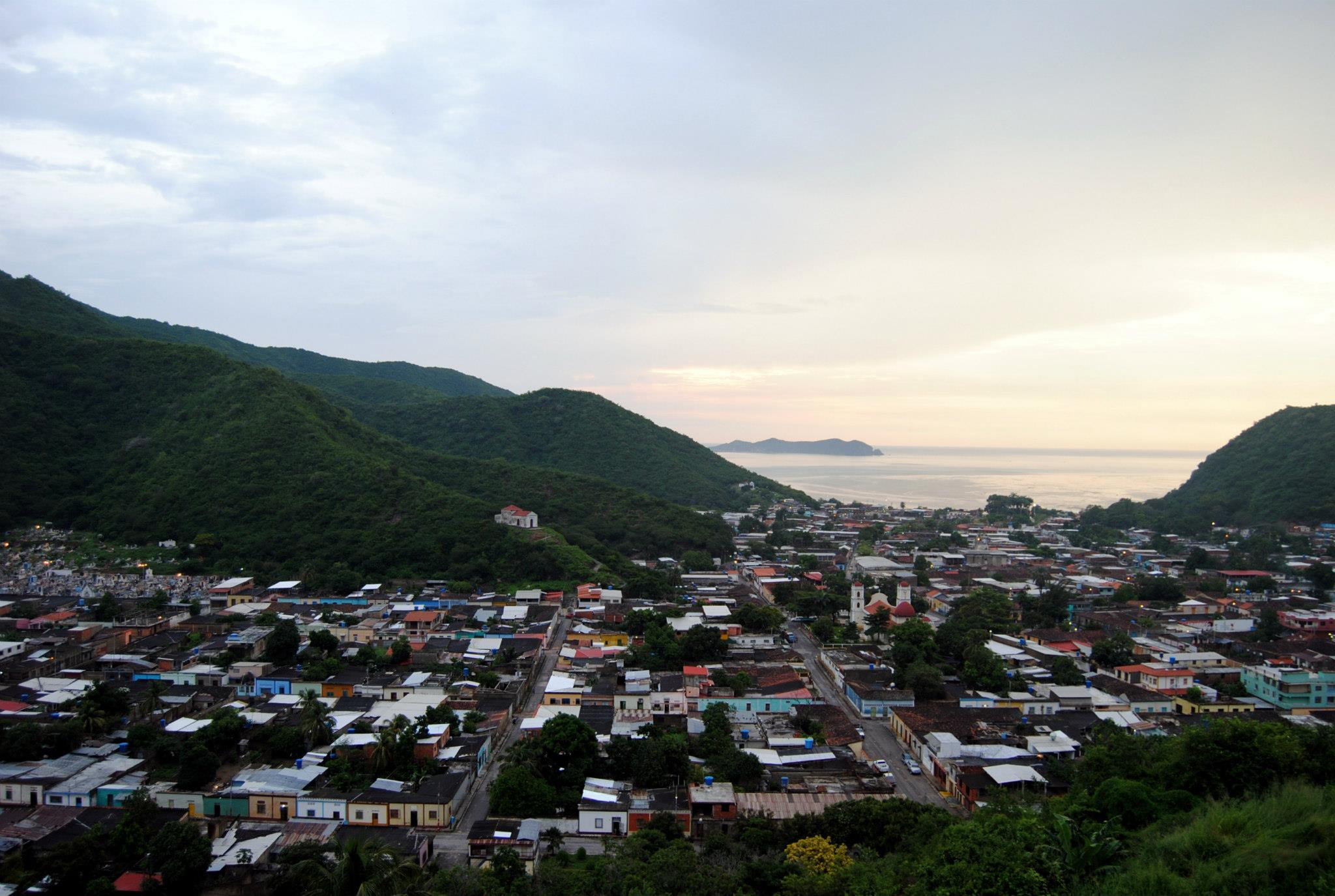 Foto tomada desde el mirador de Cristo Rey, en el pueblo de Río Caribe, Venezuela